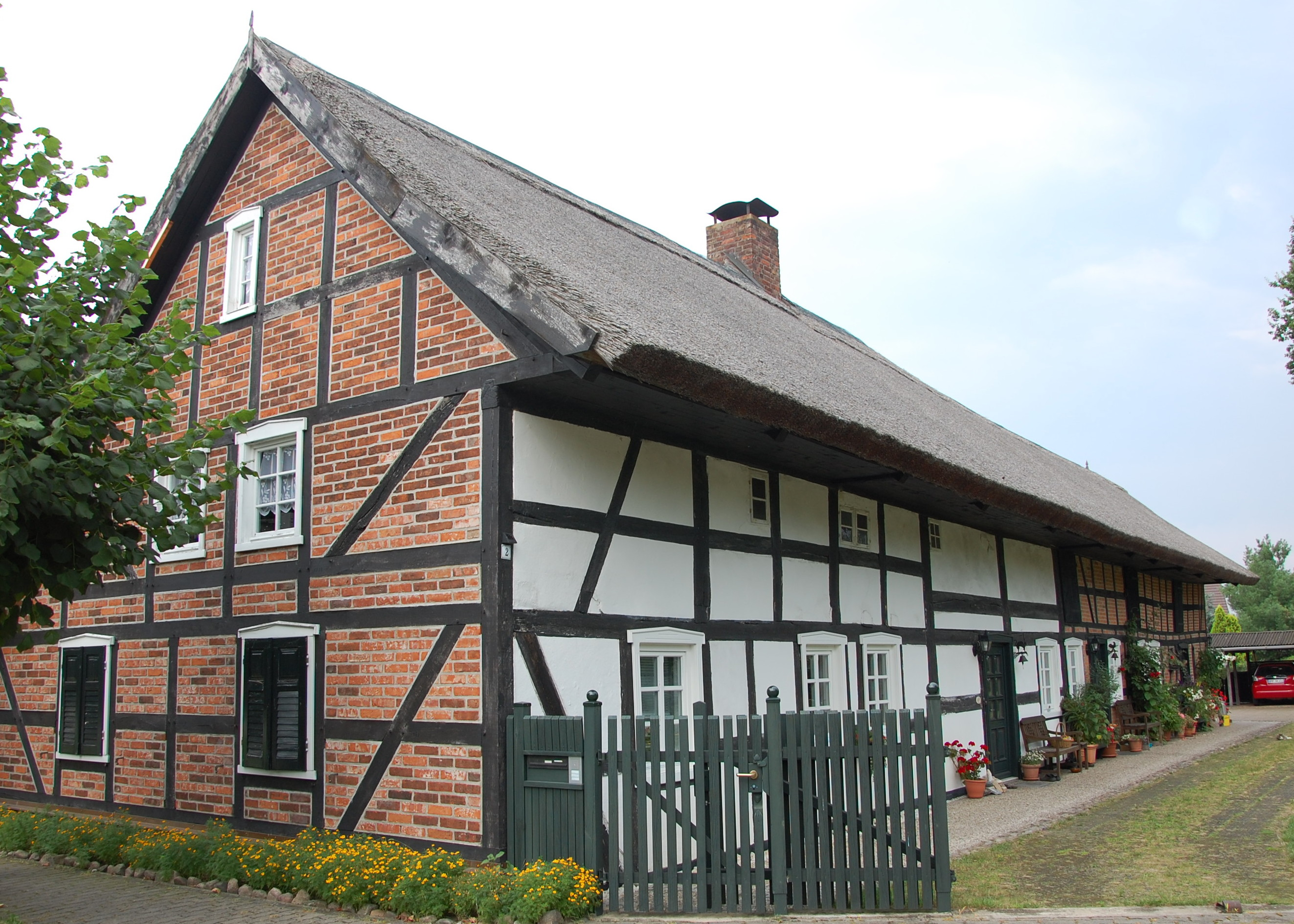 Sieversdorf Fachwerkhaus Nr 2